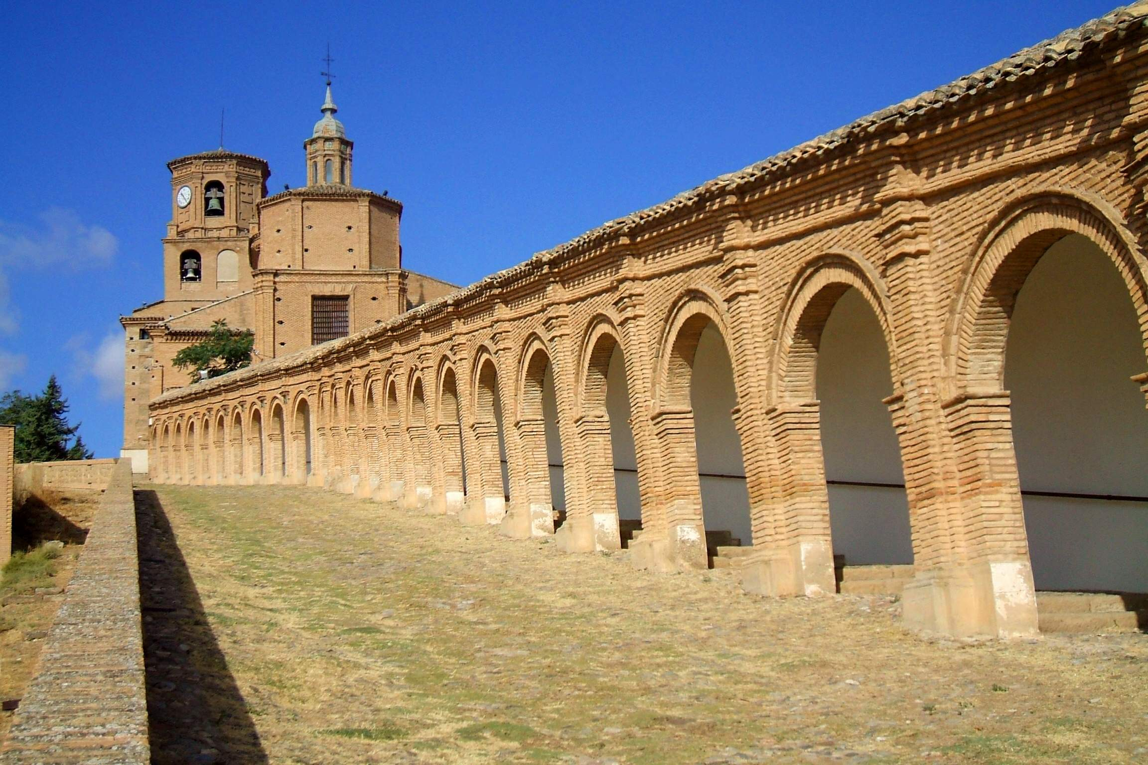 Basílica de Nuestra Señora del Romero (Cascante, Navarra)